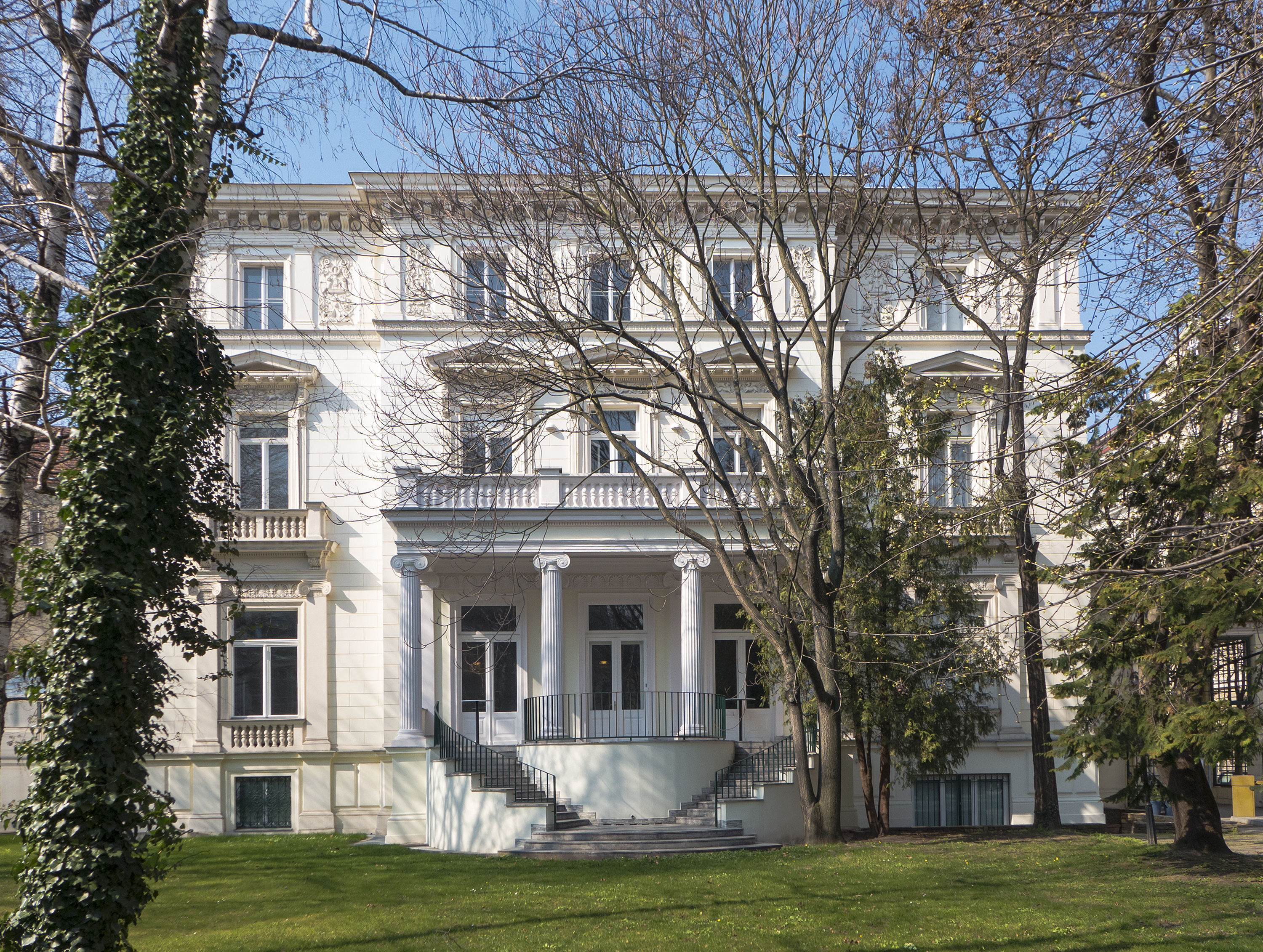 Palais Strudelhof in Wien 9